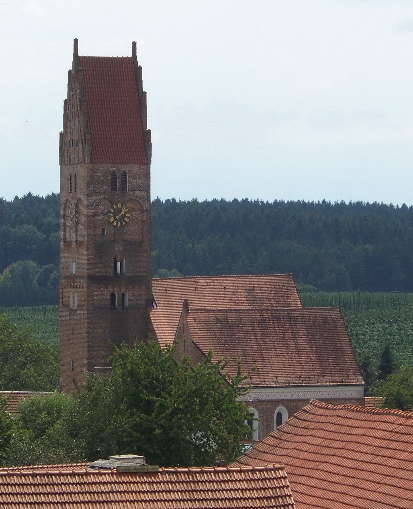 Mainburg. Ebrantshausen. Kirche St. Petrus und Paulus. Romanische Chorturmanlage, erweitert im 14./15. Jahrhundert durch ein nördliches Schiff (Heinrichs-Kapelle) und Sakristei; mit Ausstattung; Torpfeiler des Friedhofs mit mittelalterlichen Bauteilen.